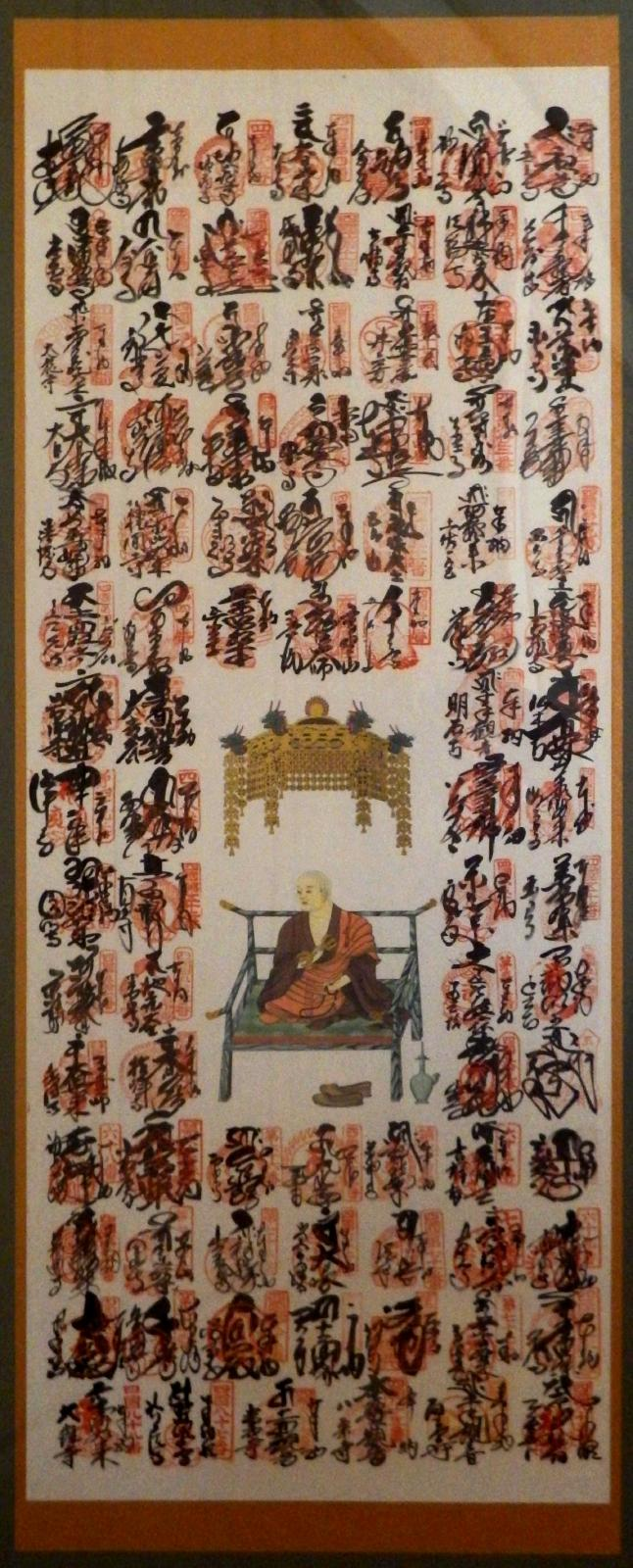 四国八十八ヶ所の掛け軸